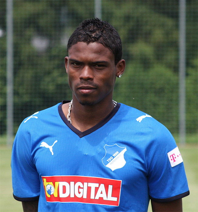 Trainingsauftakt 29.Juni 2009